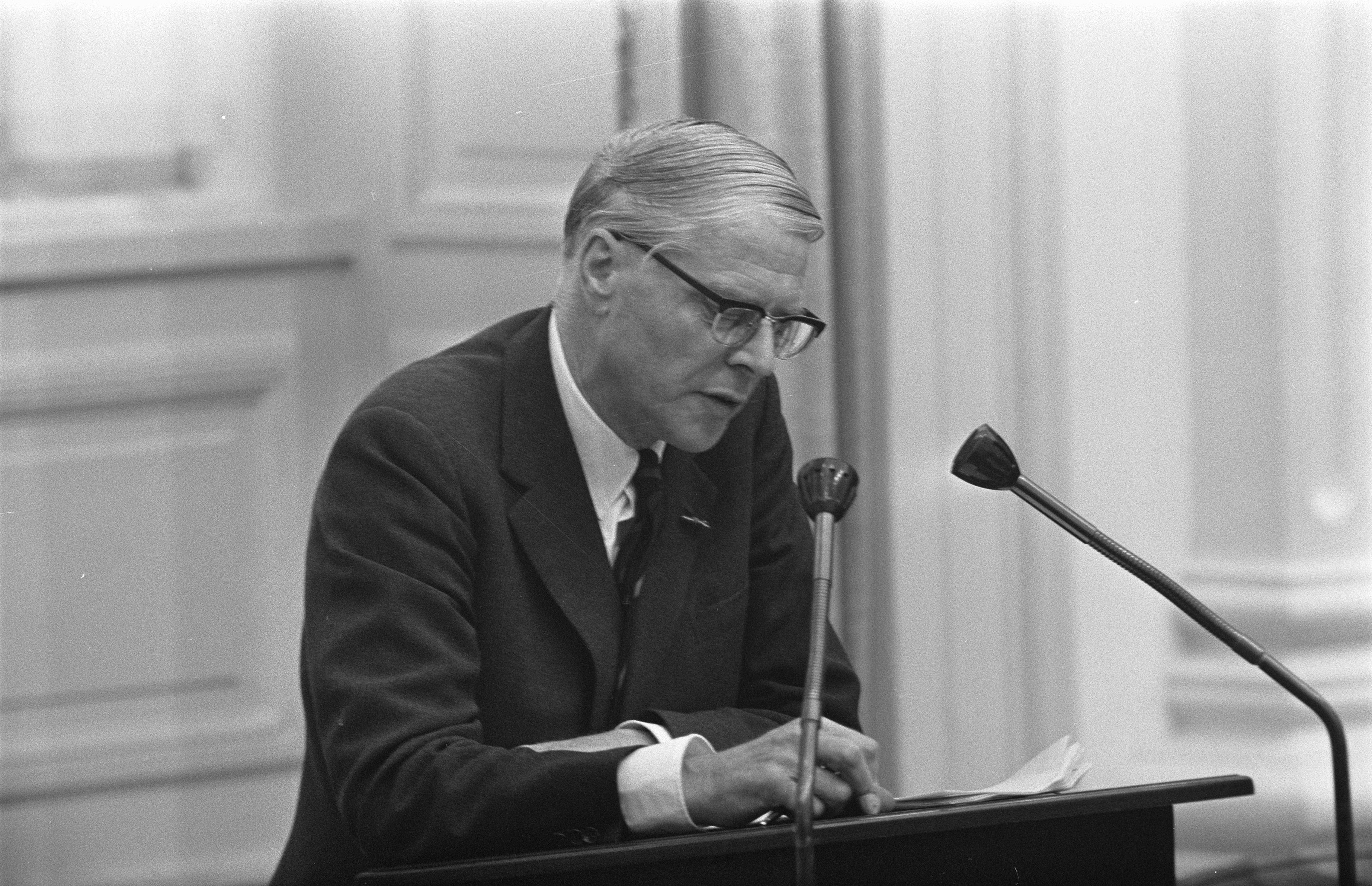 Collectie / Archief : Fotocollectie Anefo Reportage / Serie : [ onbekend ] Beschrijving : Minister van Economische Zaken De Block aan het woord tijdens de behandeling van de kwestie Verolme in Tweede Kamer in Den Haag Datum : 25 september 1969 Locatie : Den Haag, Zuid-Holland Trefwoorden : ministers, parlementaire debatten, politiek Persoonsnaam : Block, Leo de Instellingsnaam : Verolme Fotograaf : Koch, Eric / Anefo Auteursrechthebbende : Nationaal Archief Materiaalsoort : Negatief (zwart/wit) Nummer archiefinventaris : bekijk toegang 2.24.01.05 Bestanddeelnummer : 922-8223